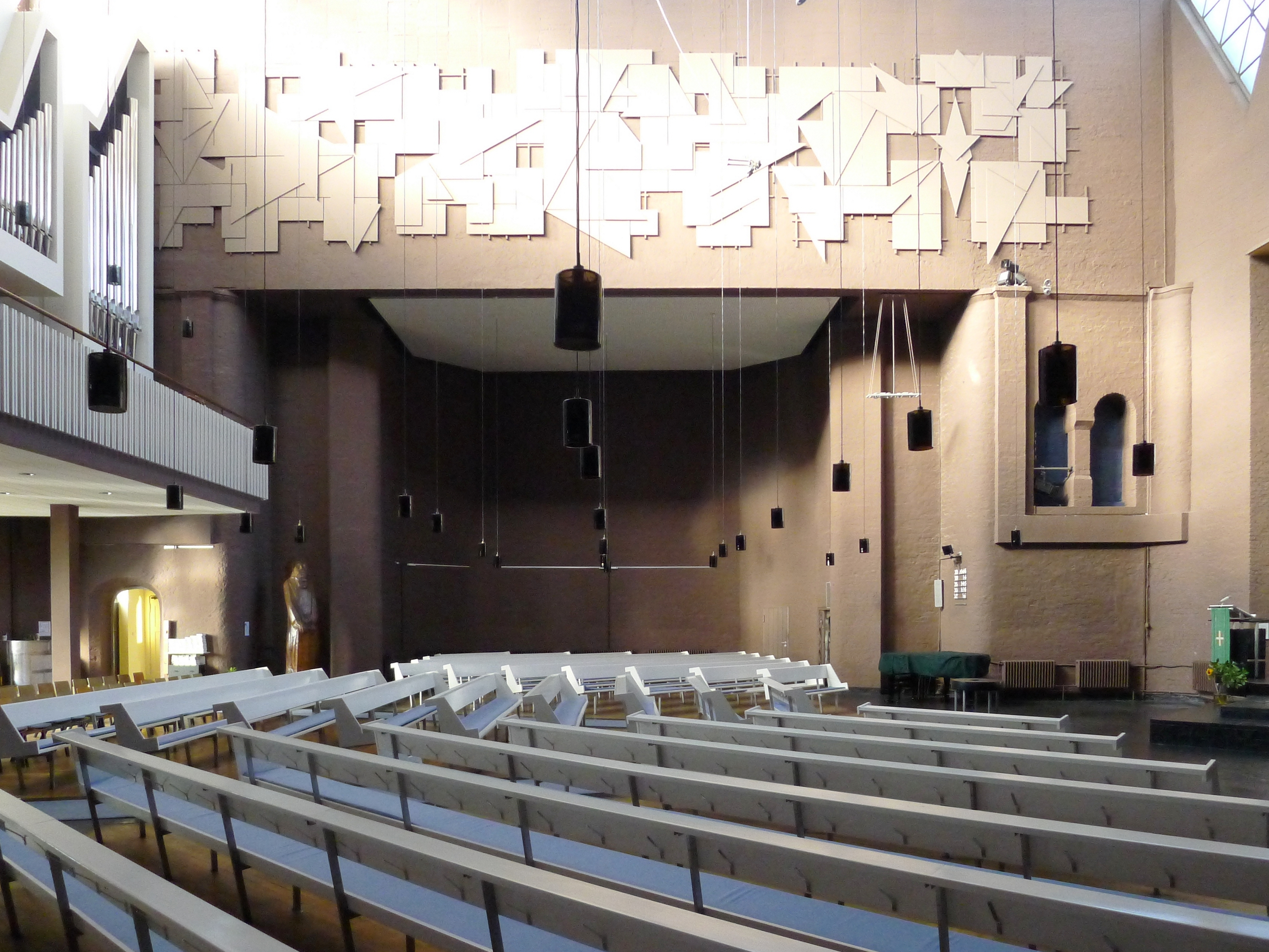 Alter Altarraum im Westen des Kirchenschiffs